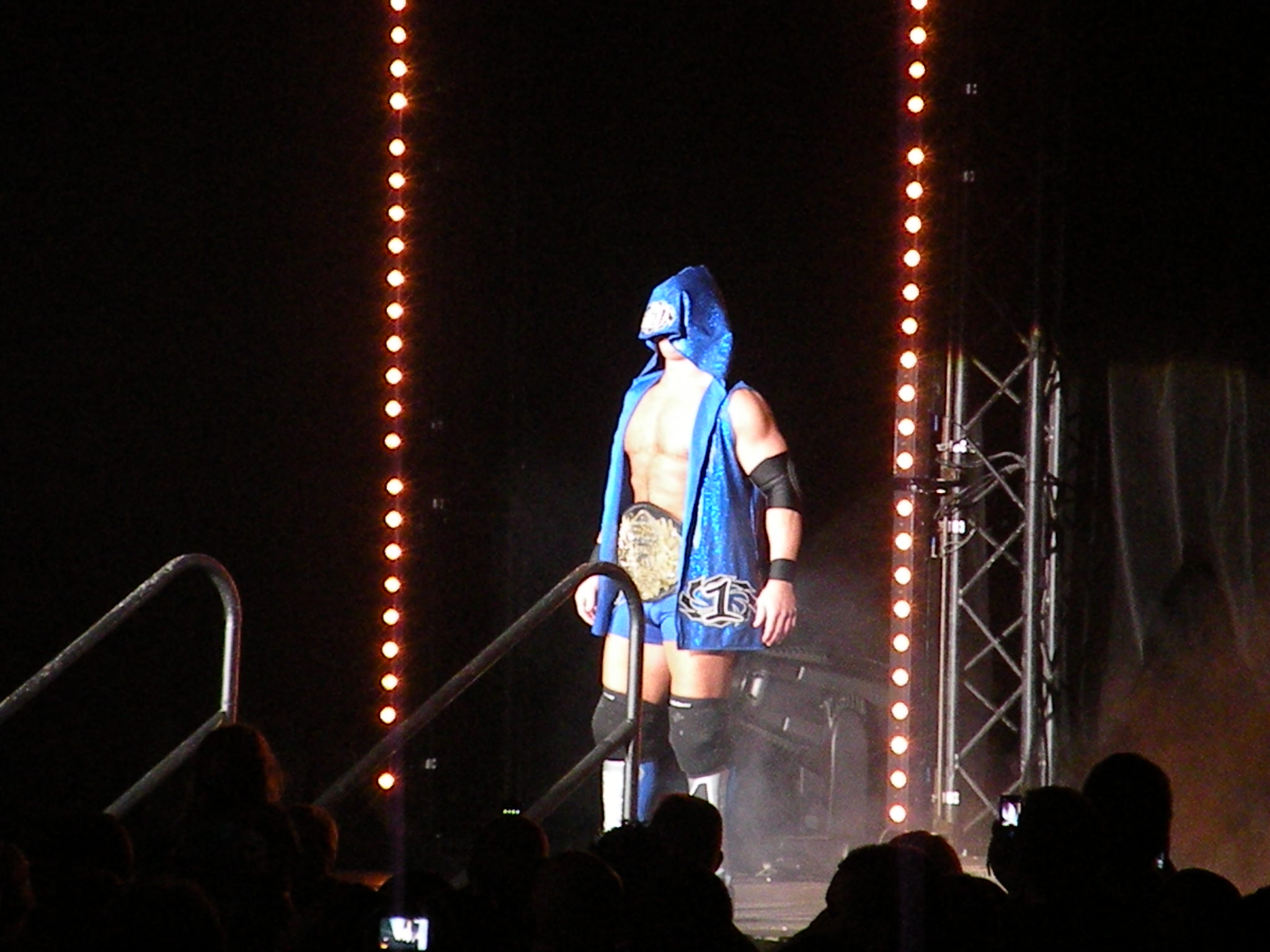 A.J. Styles tna zenith paris